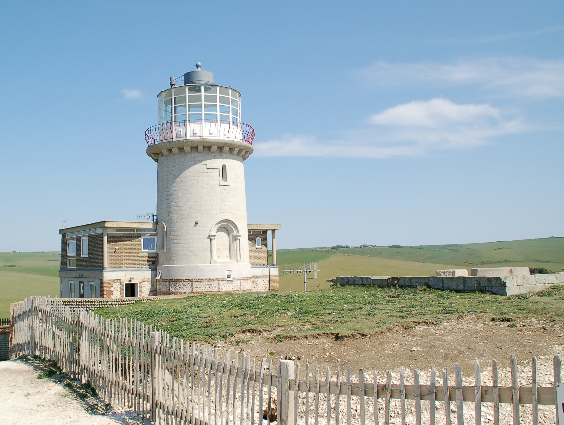 "Belle Tout Lighthouse", ca. 2 km westlich des Beachy Head